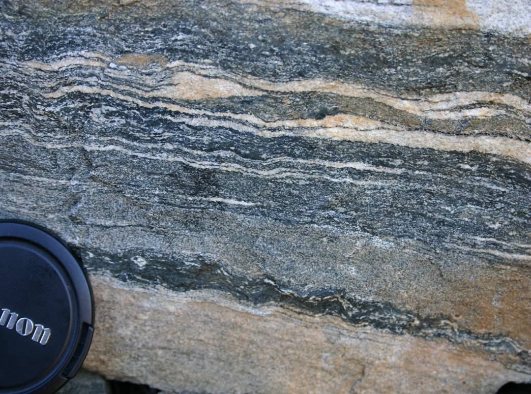 Gneis banda egitura